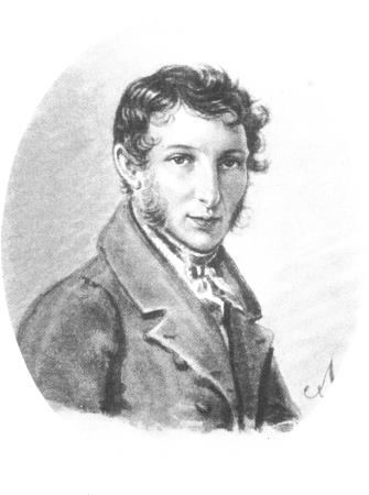 Князь Сергей Петрович Трубецкой